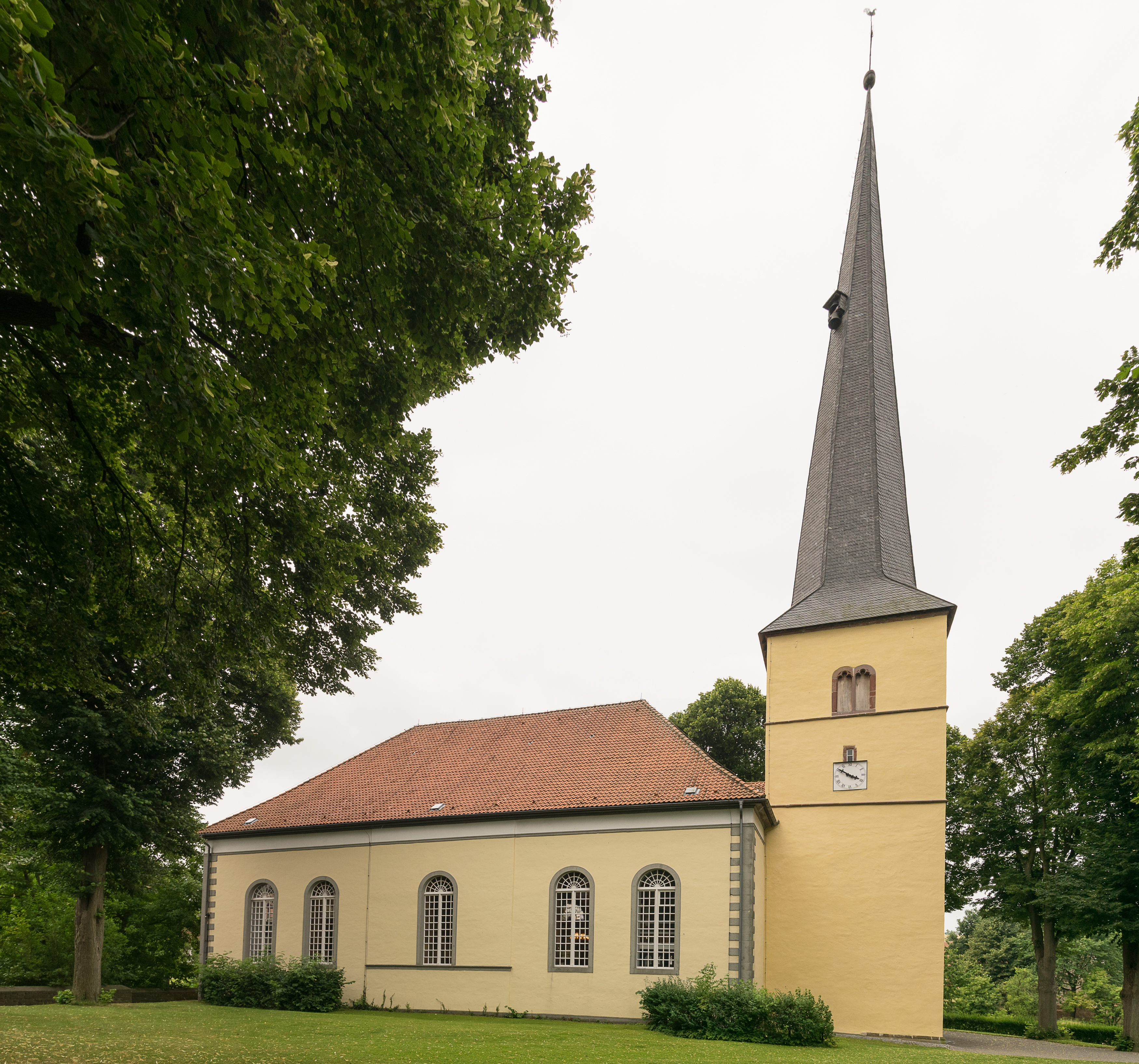 Evangelisch-refomierte Kirche in Blomberg-Cappel